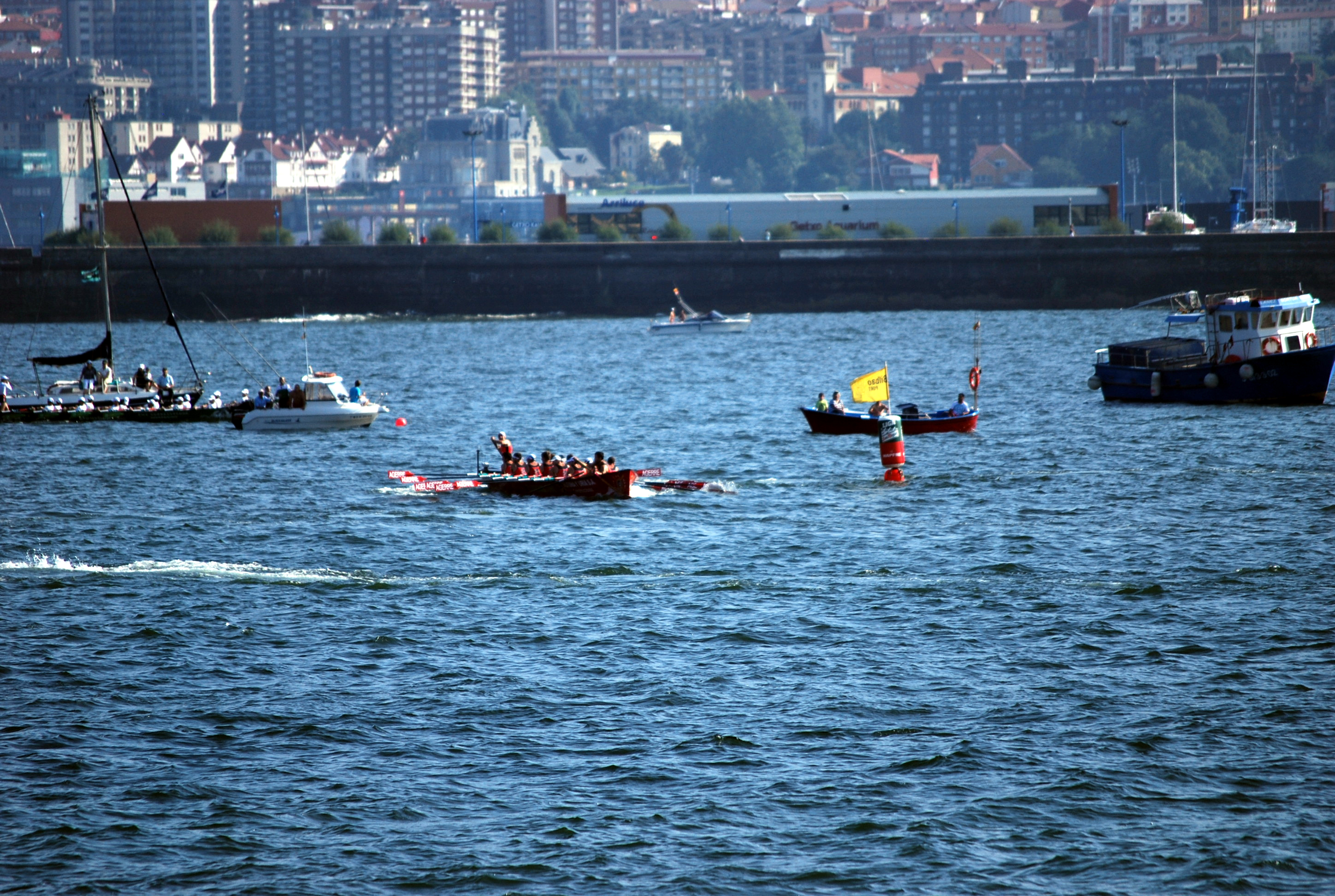 Départ de la première manche à Getxo (Biscaye).